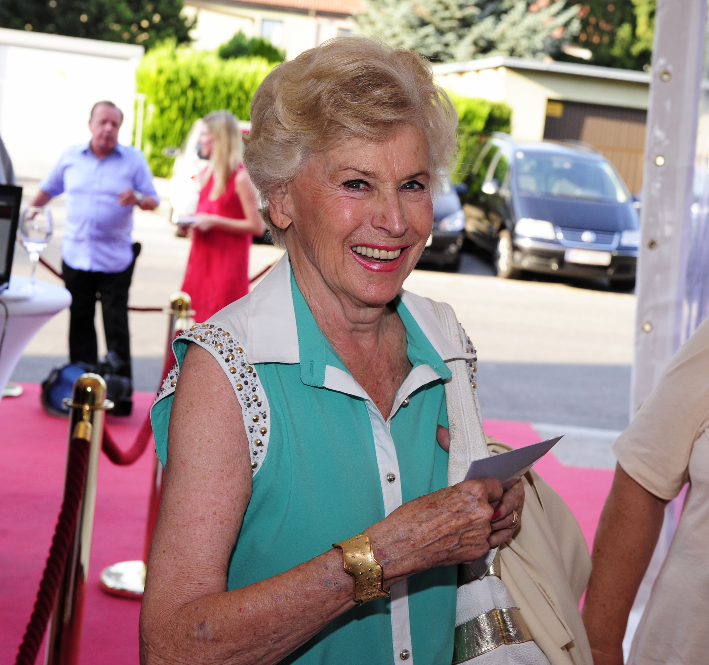 Sommerfest der SPÖ am 3. August im Gartenhotel Altmannsdorf.